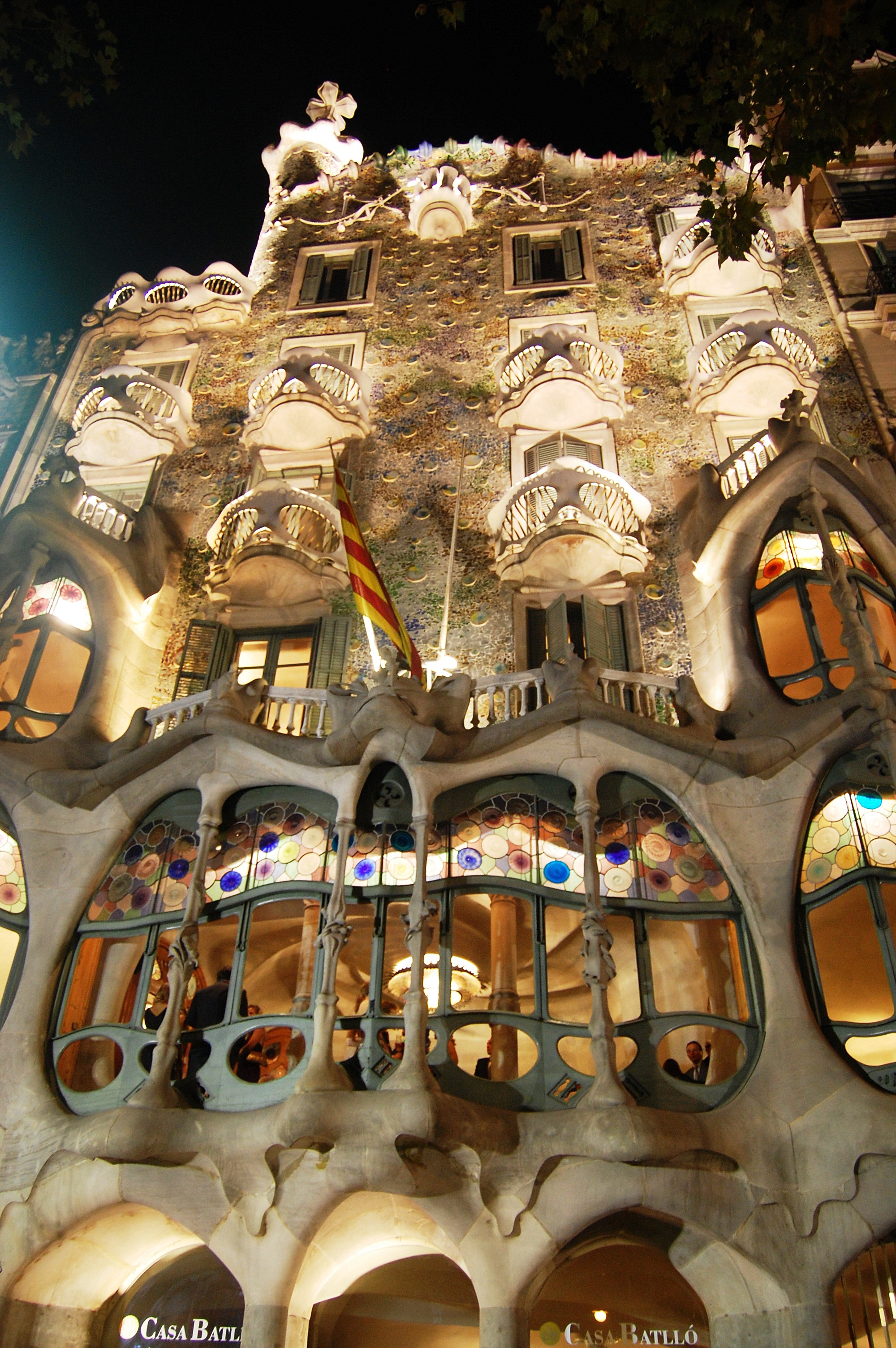 Casa Batlló - Barcellona Antoni Gaudi